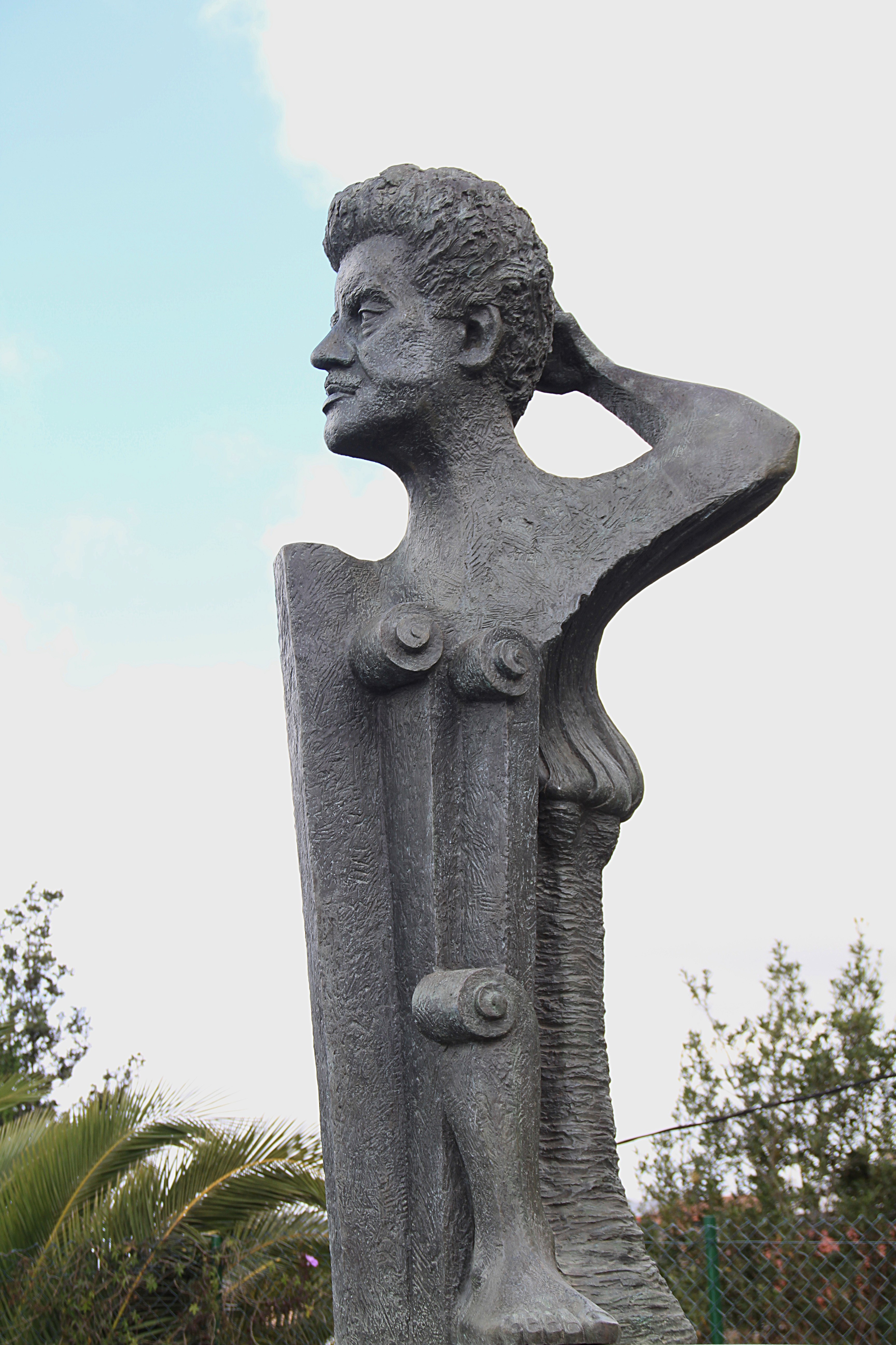 Monumento homenaje a Óscar Domínguez en el núcleo urbano de Tacoronte (Santa Cruz de Tenerife, España). Autor: Medín Martín. Fotografía: Héctor García Suárez